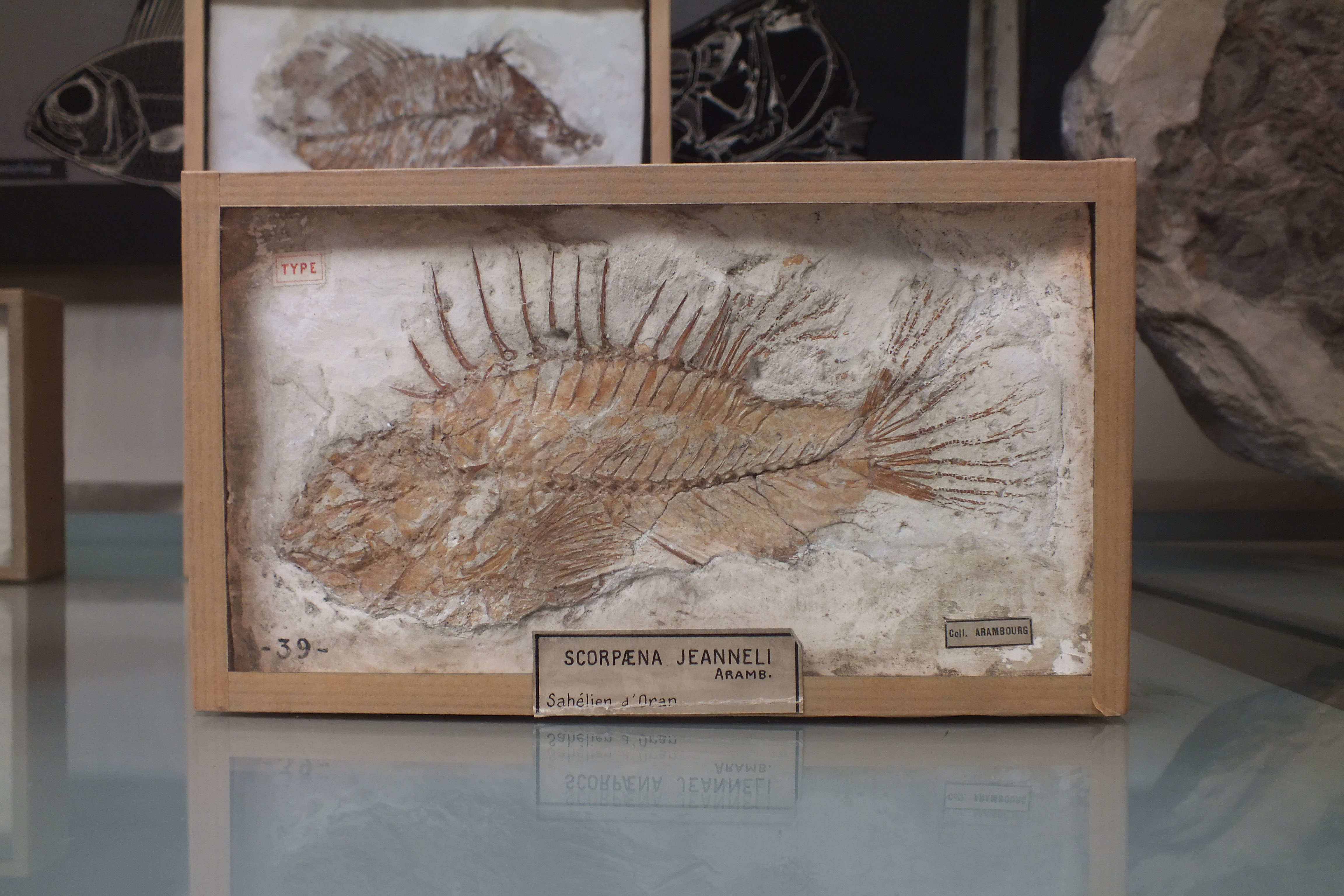 Scorpaena jeanneli, spécimen type, Galerie de Paléontologie, Muséum national d'Histoire naturelle